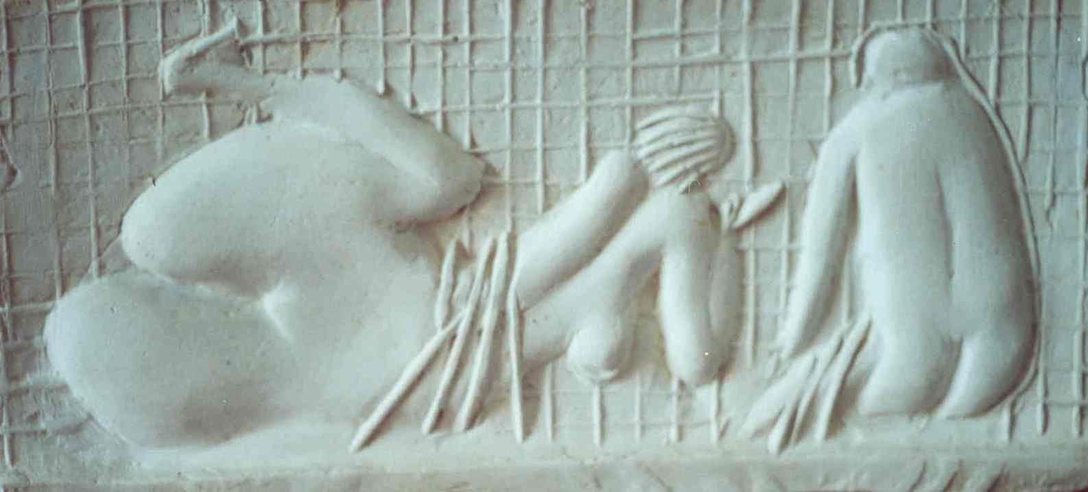 Константин Мирославович Козловский. Автопортрет с музой (рельеф). 1990 г., гипс, 41 см х 40 см).